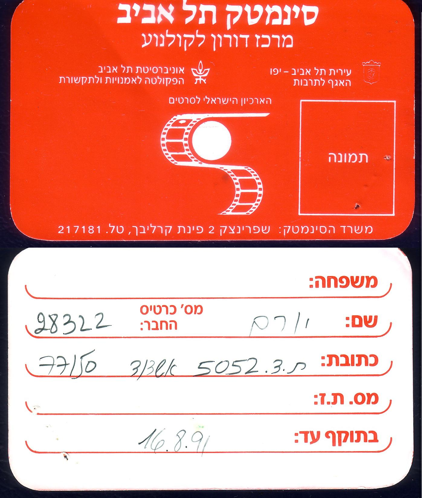 סינמטק תל אביב, כרטיס חבר 1990